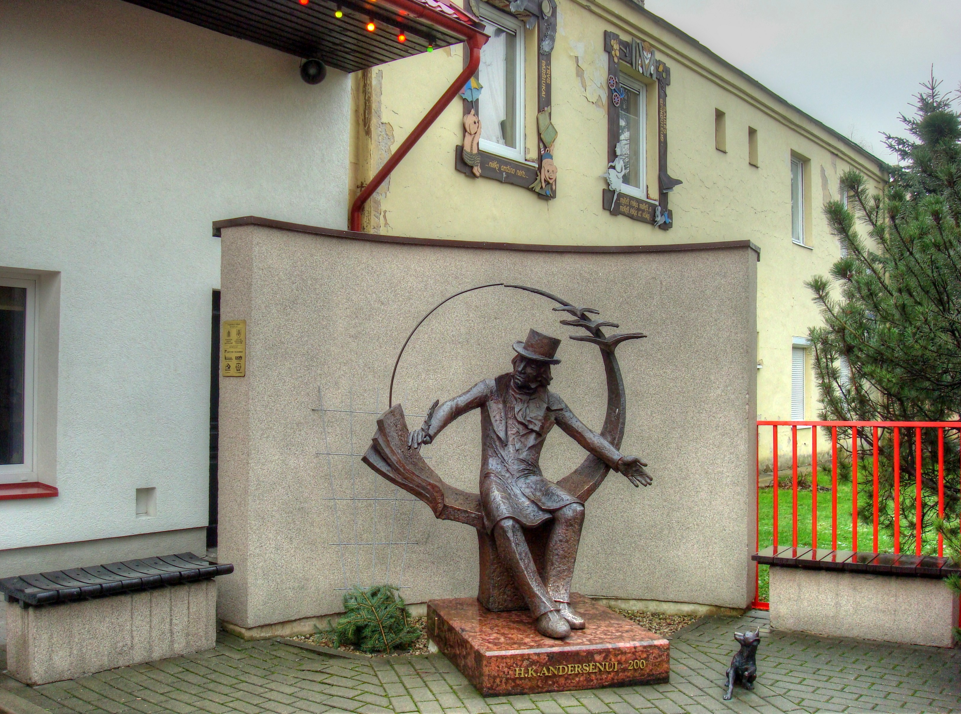 Andersen in Panevezys